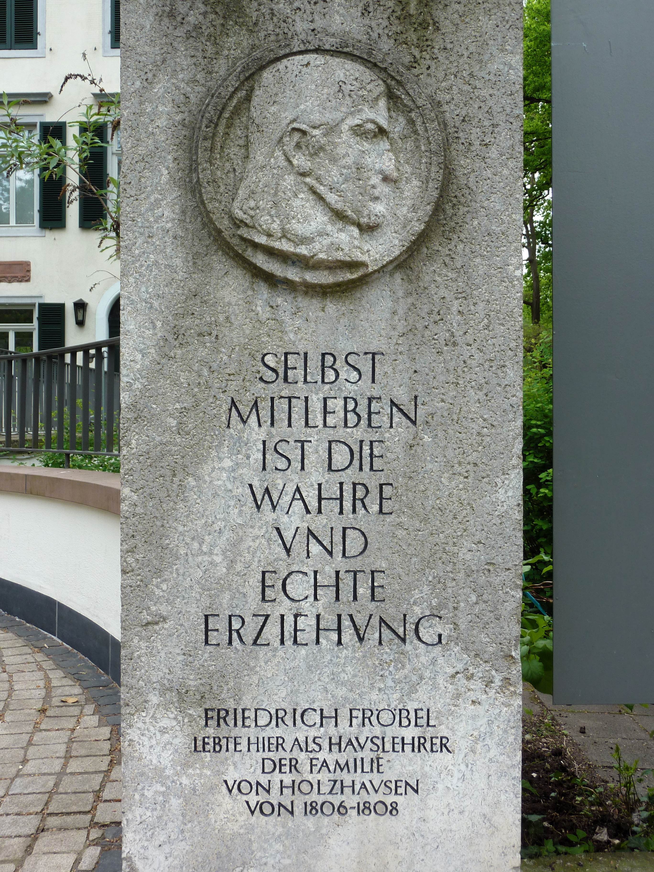 Denkmalstele für Friedrich Fröbel, deutscher Pädoagoge (1782–1852), Hauslehrer der Frankfurter Familie Holzhausen, vor dem Eingang des Holzhausenschlösschens im Frankfurter Stadtteil Nordend. Inschrift (Interpunktion teilweise hinzugefügt): „Selbst Mitleben ist die wahre und echte Erziehung. Friedrich Fröbel lebte hier als Hauslehrer der Familie von Holzhausen von 1806–1808“